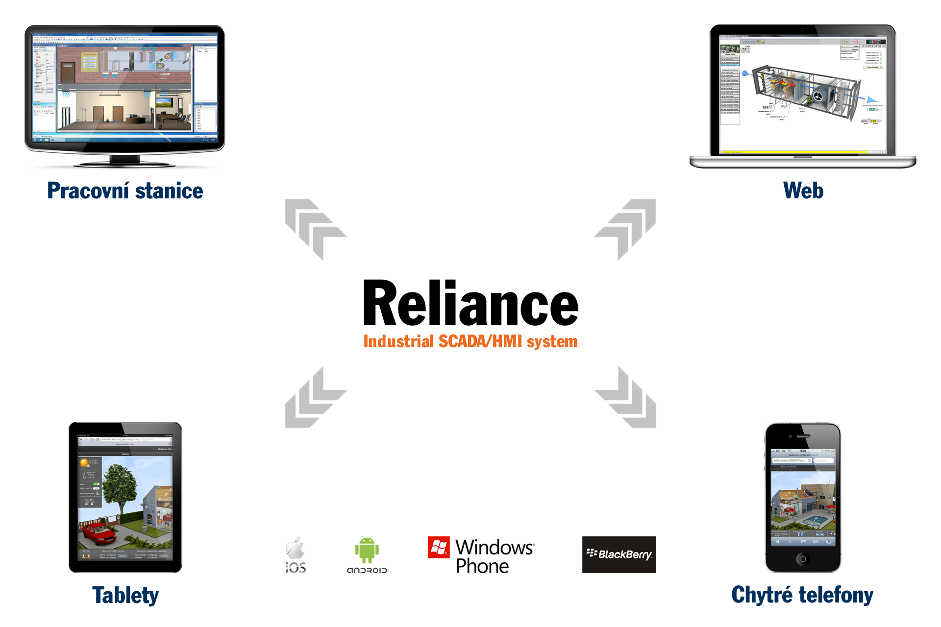 Reliance 4 - schema podporovaných typů zobrazení